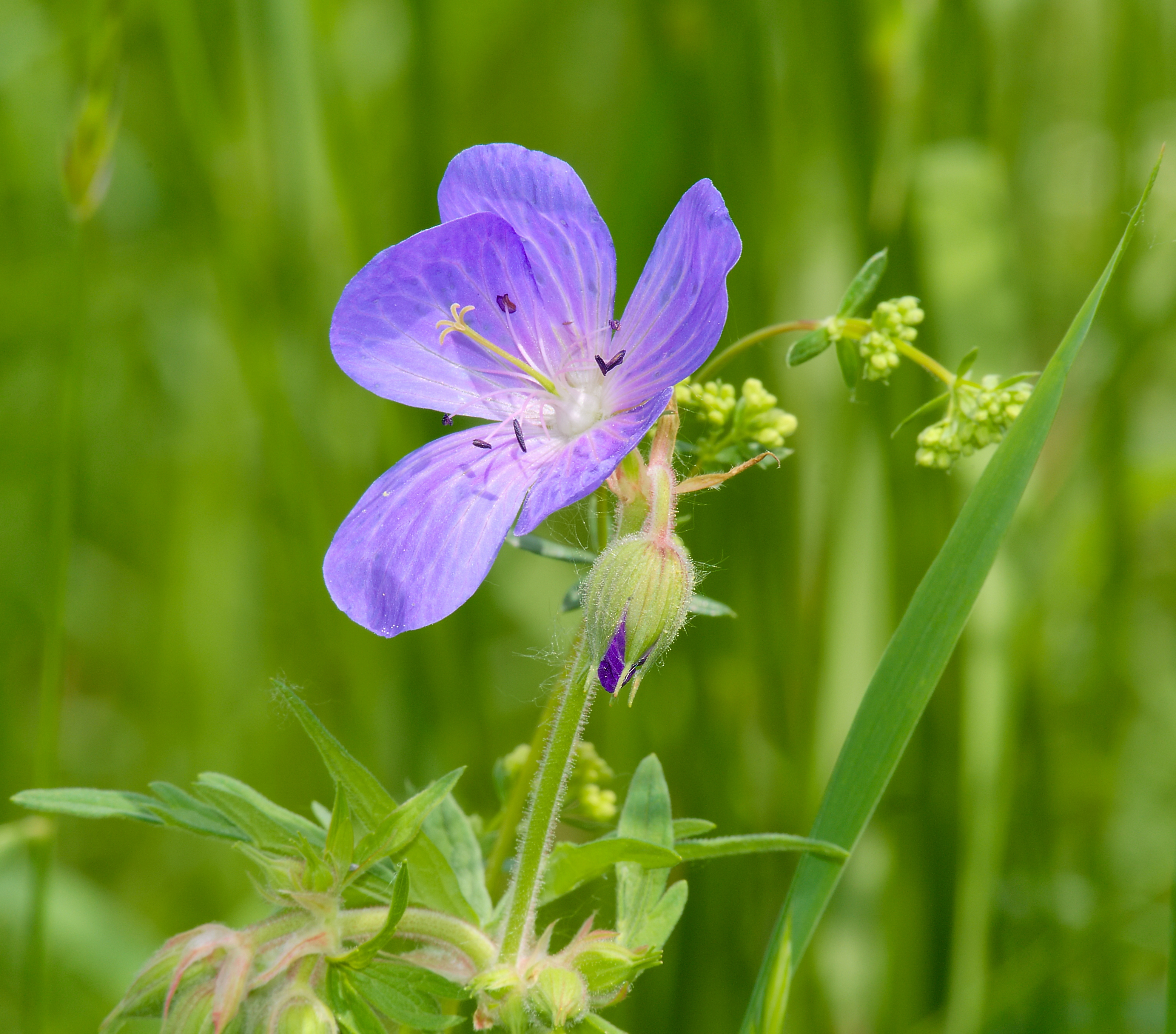 Wiesen-Storchschnabel - Geranium pratense. Aufgenommen in Mannheim, Kirschgartshäuser Schläge am Bruchgraben, Baden-Württemberg, Deutschland.